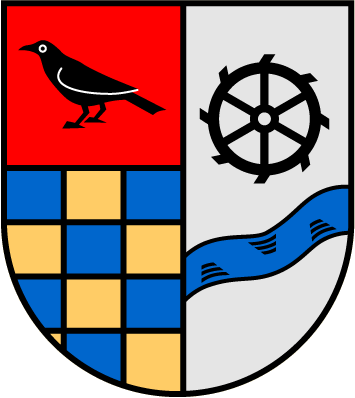 Wappen der Ortsgemeinde Steinbach im Hunsrück